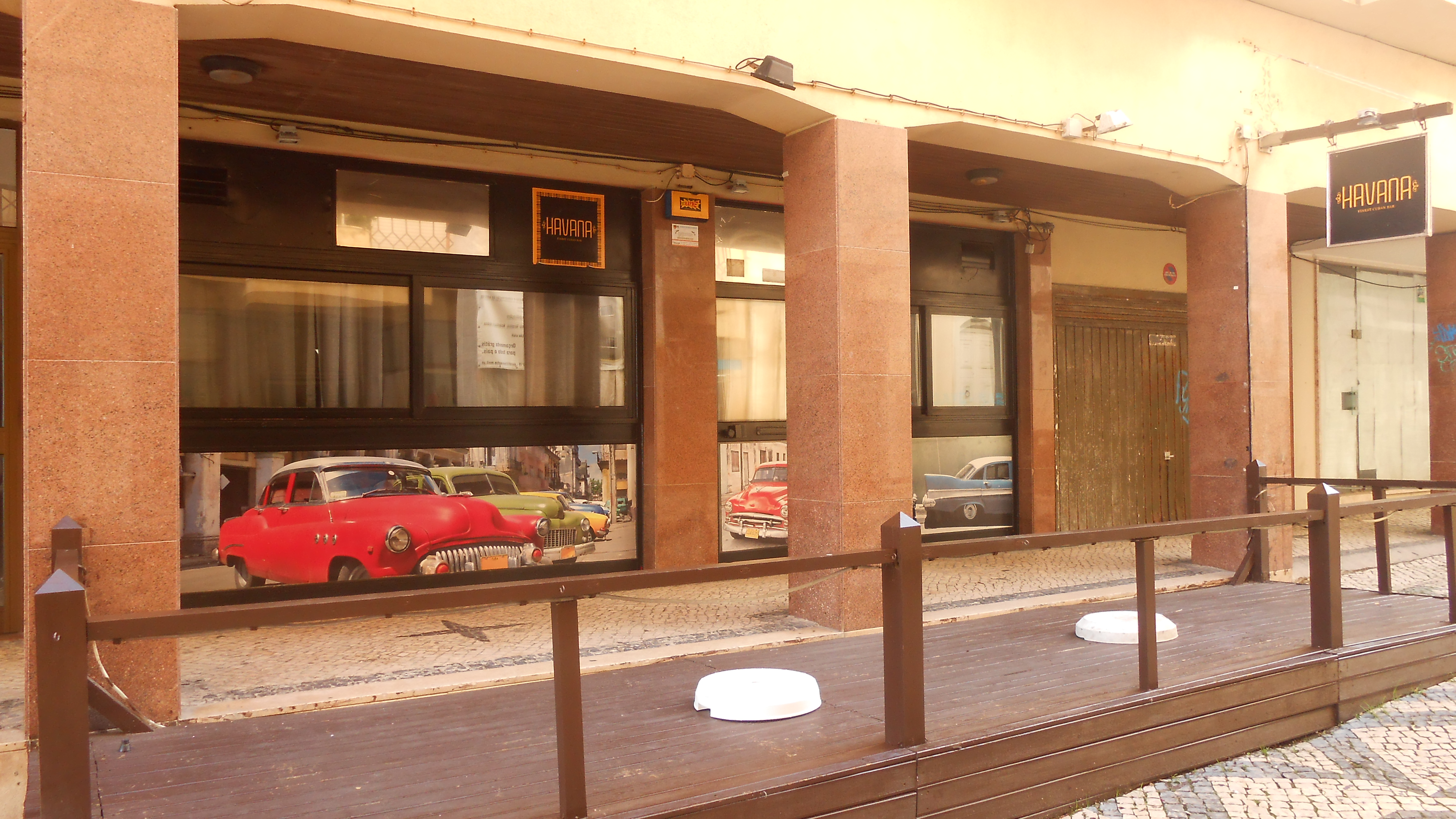 O Bar Havanna no centro da cidade da Figueira da Foz.